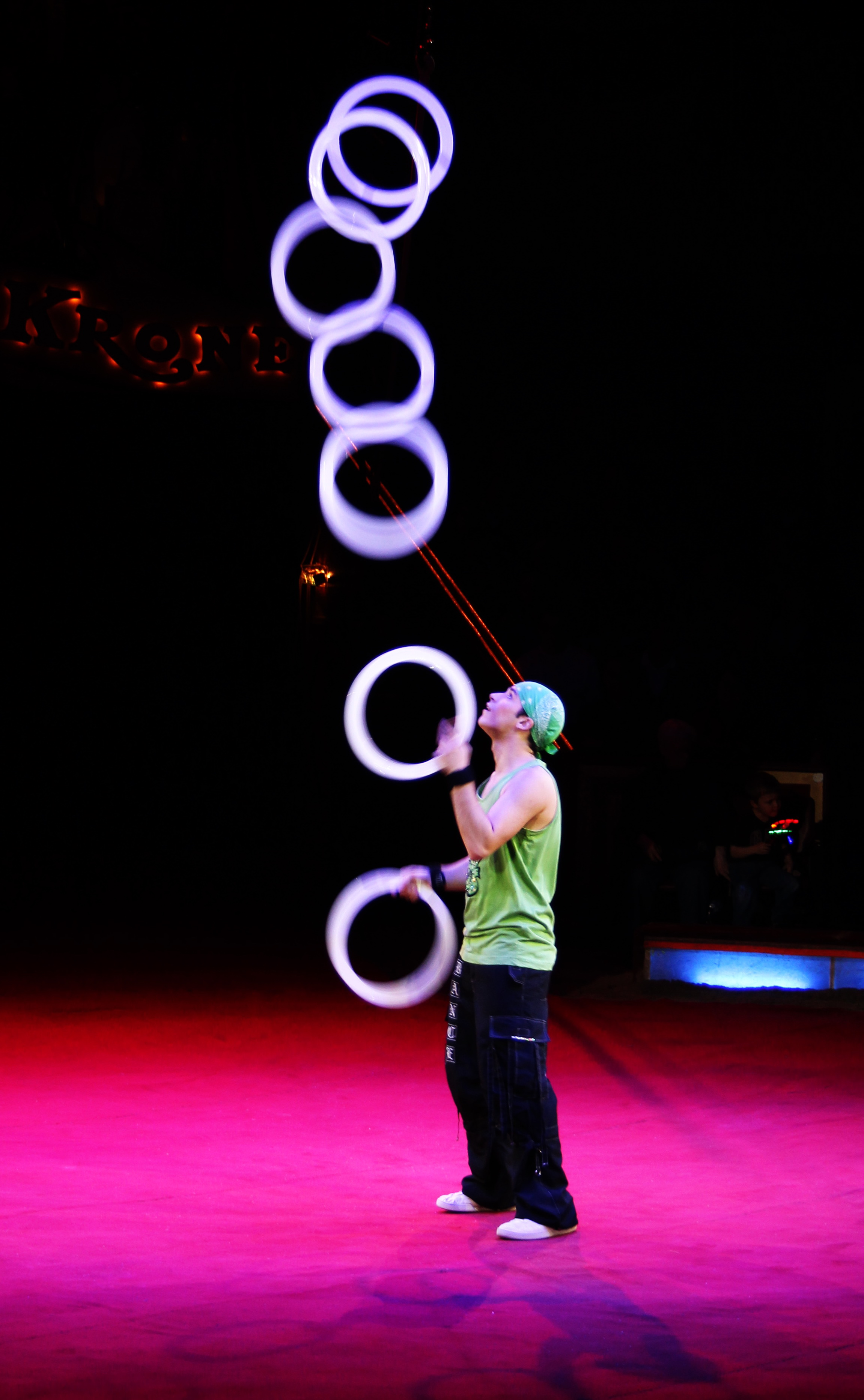 Jongleur Dany Reyes im Zirkus